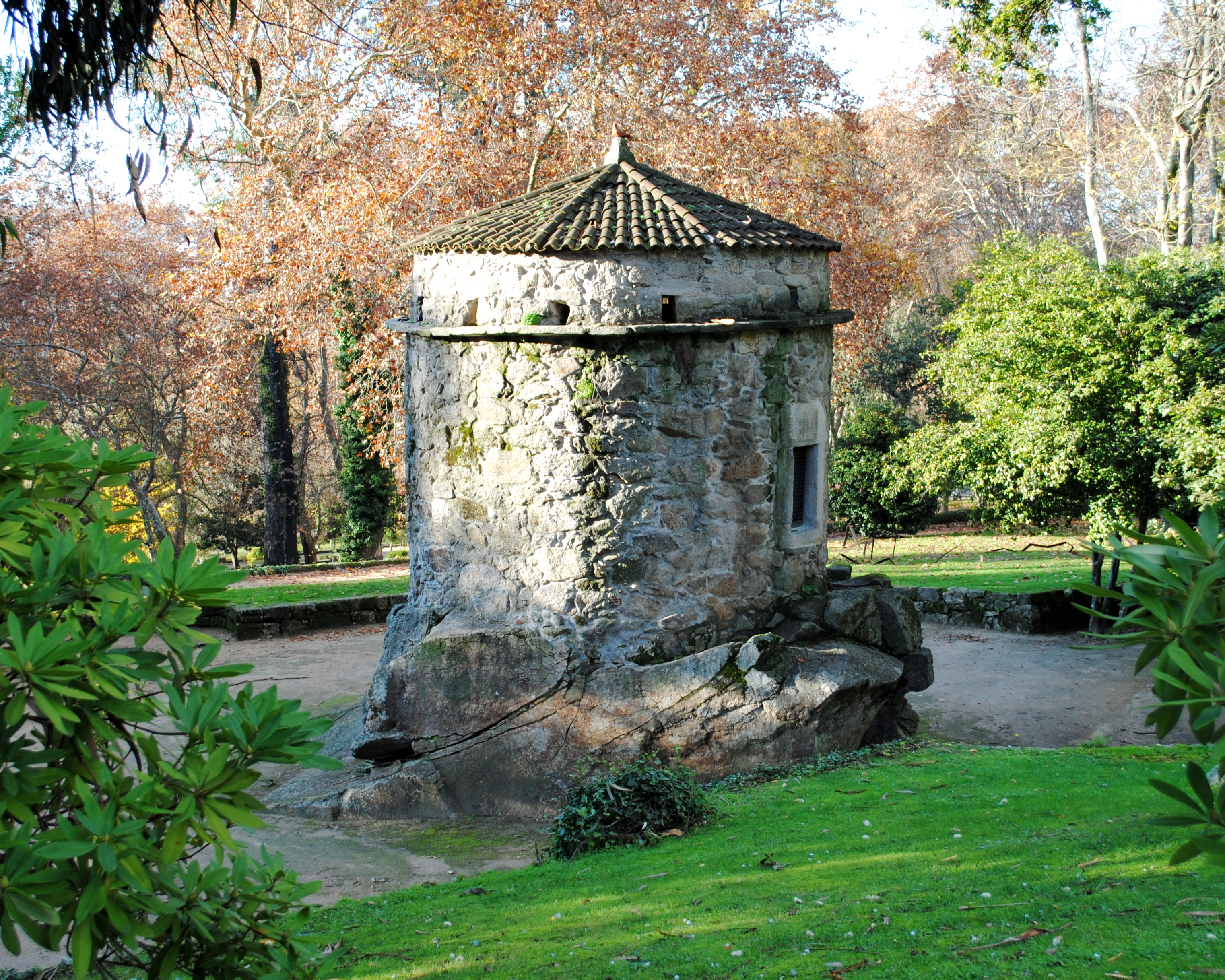 Pazo de Castrelos, pombal